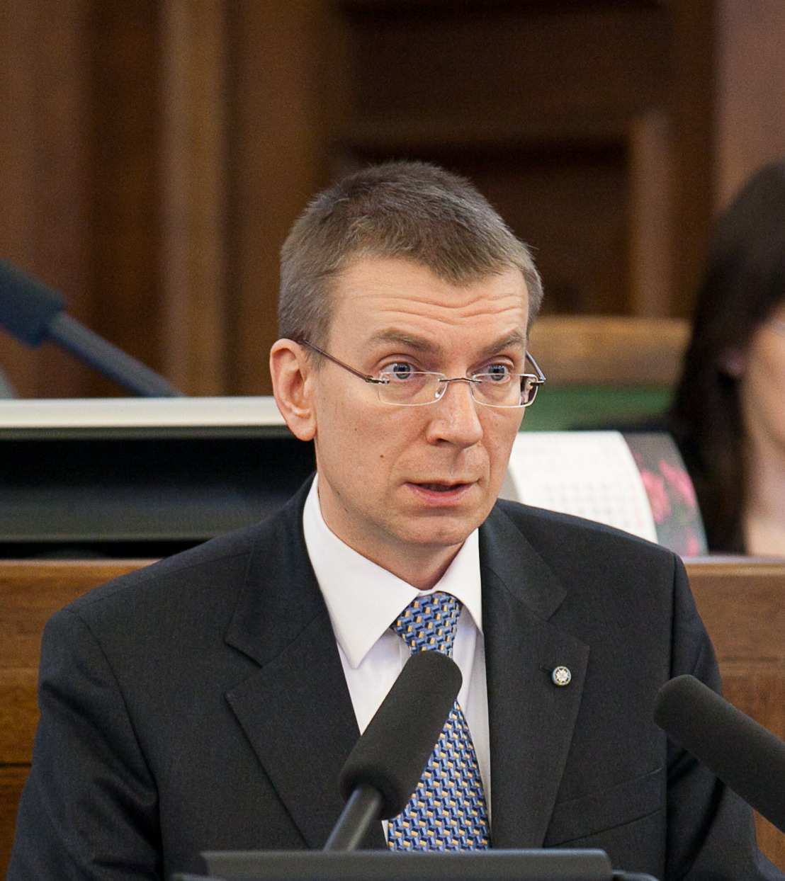 2012.gada 26.janvāris. Saeimā notiek ikgadējās ārpoltikas debates. Sēdes sākumā par paveikto un iecerēto valsts ārpolitikā uzrunu saka ārlietu ministrs Edgars Rinkēvičs. Foto: Ernests Dinka, Saeimas Kanceleja